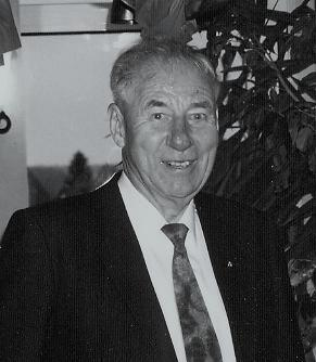 Prof. Dr. Walter H. Schuster in Wetzlar an seinem 80. Geburtstag am 7. November 1998